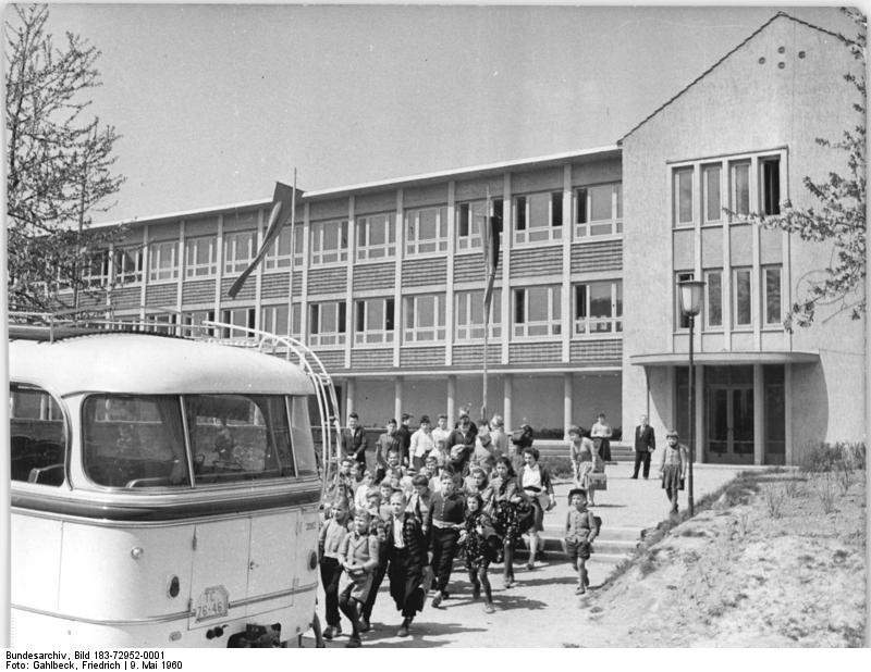 Milkau, Blick auf die Oberschule Zentralbild Gahlbeck 9.5.1960 Milkau-ein Dorf 15 Jahre nach der Befreiung Sichtbarer Ausdruck des neuen Lebens sind heute in der kleinen Gemeinde Milkau, Krs. Rochlitz, die drei Landwirtschaftlichen Produktionsgenossenschaften, die neue zehnklassige Oberschule, der Kindergarten, der Sprotplat sowie Stall- und Wohnungsneubauten. "Die Entwicklung in den verganenen 15 Jahren hat uns gezeigt, das es ohne Gutsbesitzer besser geht und wir gut vorankommen", erklärte der Genossenschaftsbauer Max Kurze. UBz: Die zehnklassige polytechnische Oberschule.-Der Kostenaufwand für den Neubau der Schule betrug 1, 2 Mill. DM; die Schule hat einen Physik- und Chemieraum. Außerdem steht den Kindern ein Musiksaal und eine Turnhalle zur Verfügung. Kinder aus sechs Gutschaften werden mit Bussen zur Schule gebracht.